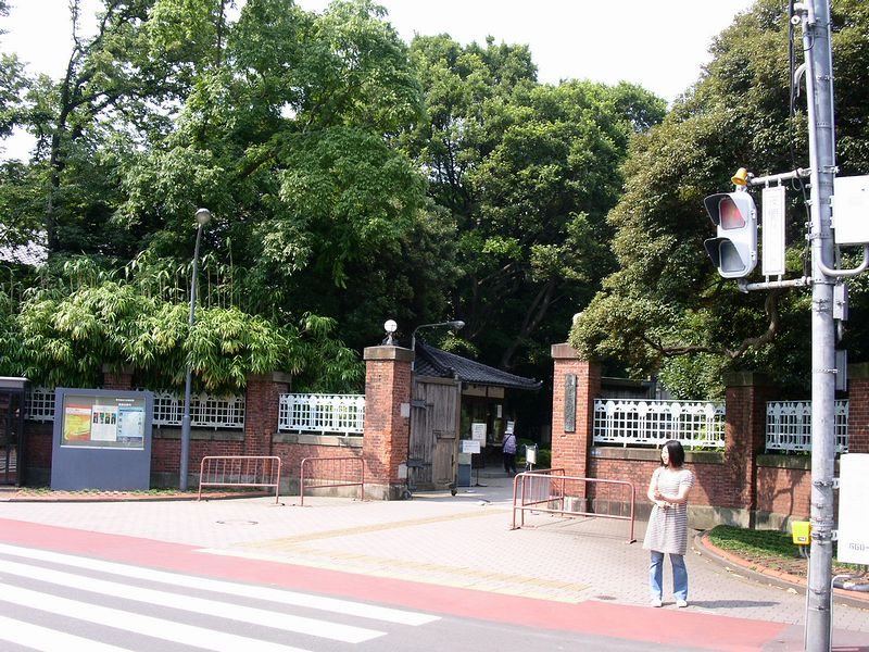 東京芸術大学前